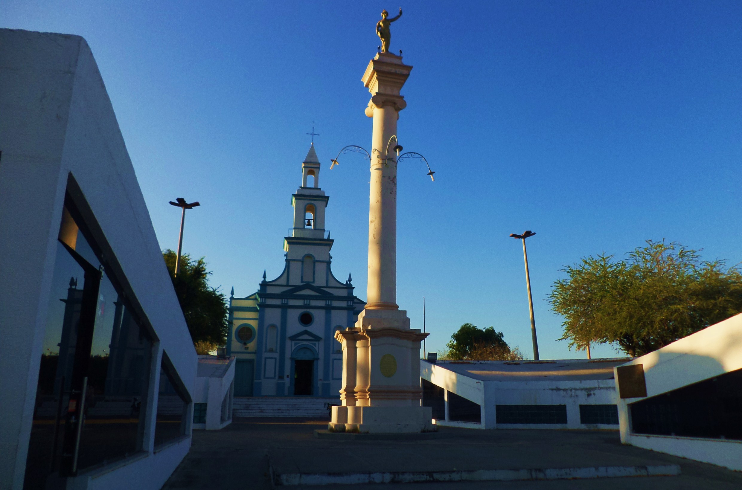 A Cidade de Sobral, Ceará; Museu do Eclipse; Igreja do Patrocínio.